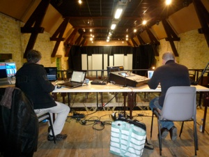 régie avec Vimi, Dlight et PolyAurès